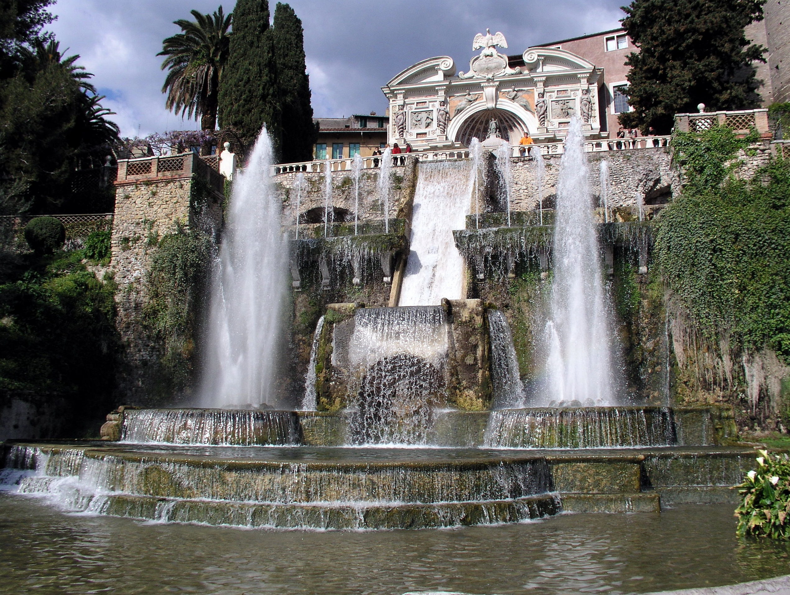 Tivoli, Villa d'Este, Neptunbrunnen und Wasserorgel